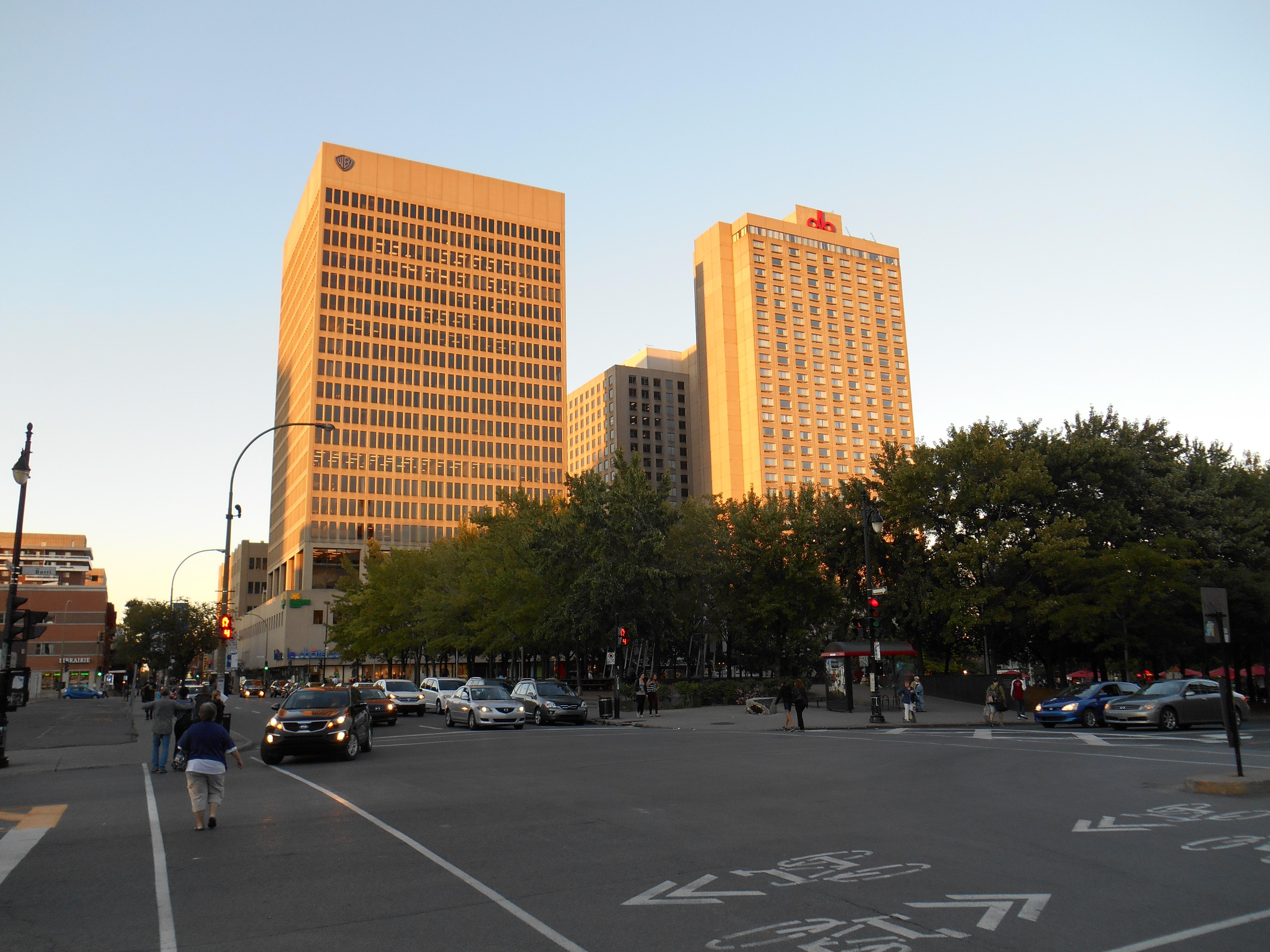 Place Dupuis, Montréal, vue de l'ouest À gauche : Tour de la place Dupuis, 1475, rue Saint-Hubert, Montréal. Construite en 1974, elle est haute de 91 m et compte 23 étages (hors-sol). À droite : Hôtel Gouverneur Place Dupuis, 1415, rue Saint-Hubert, Montréal. Construit en 1973, il est haut de 108 m et comporte 30 étages (hors-sol). Images Montréal